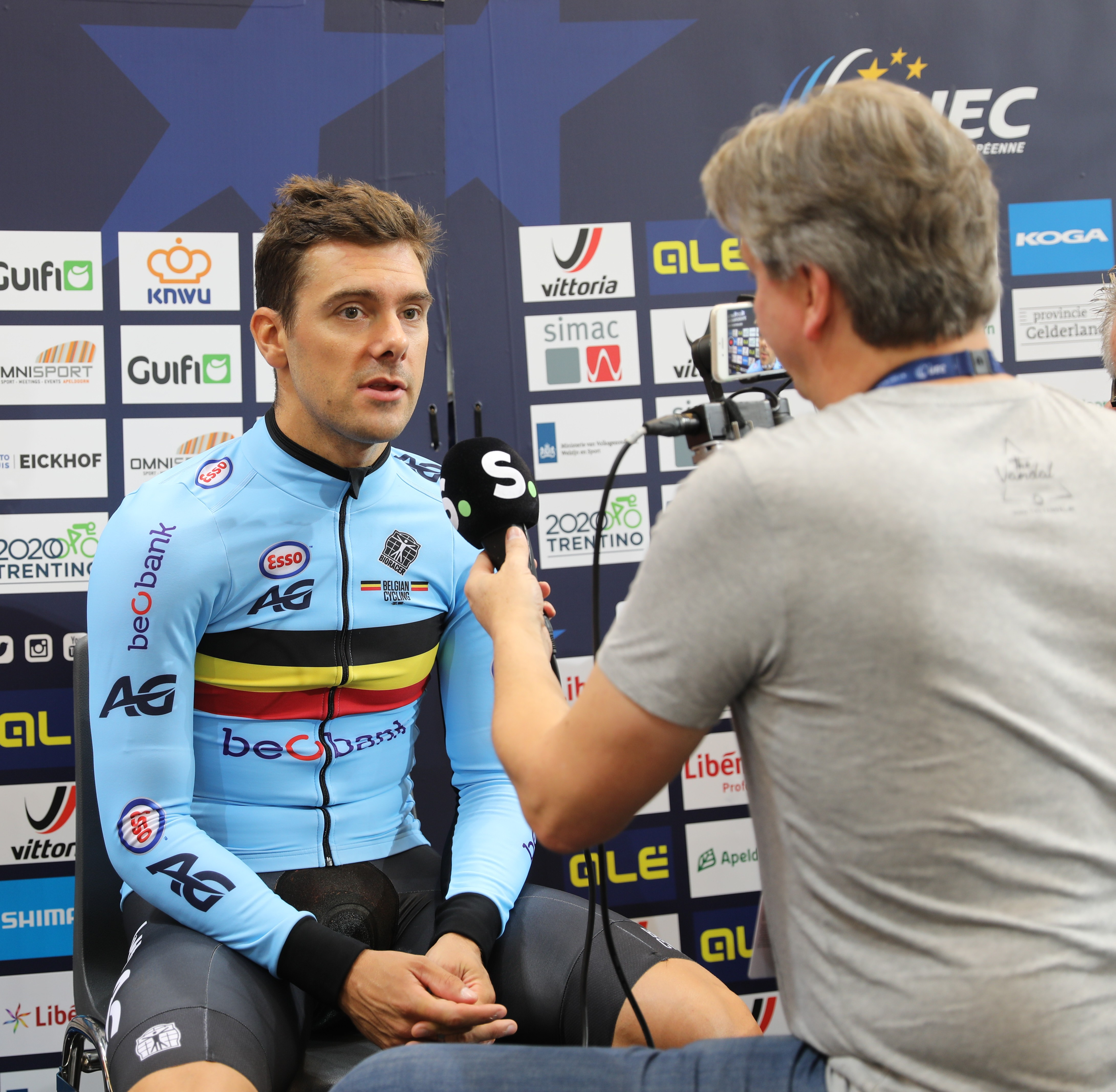 Kenny de Ketele, Radsportler aus Belgien, im Interview